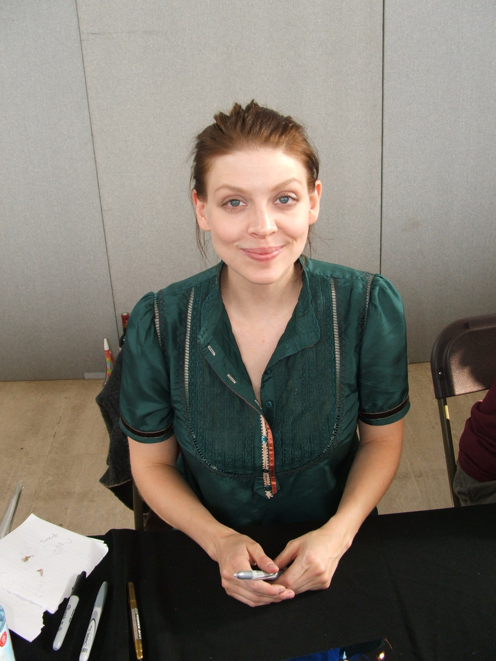 Amber Benson